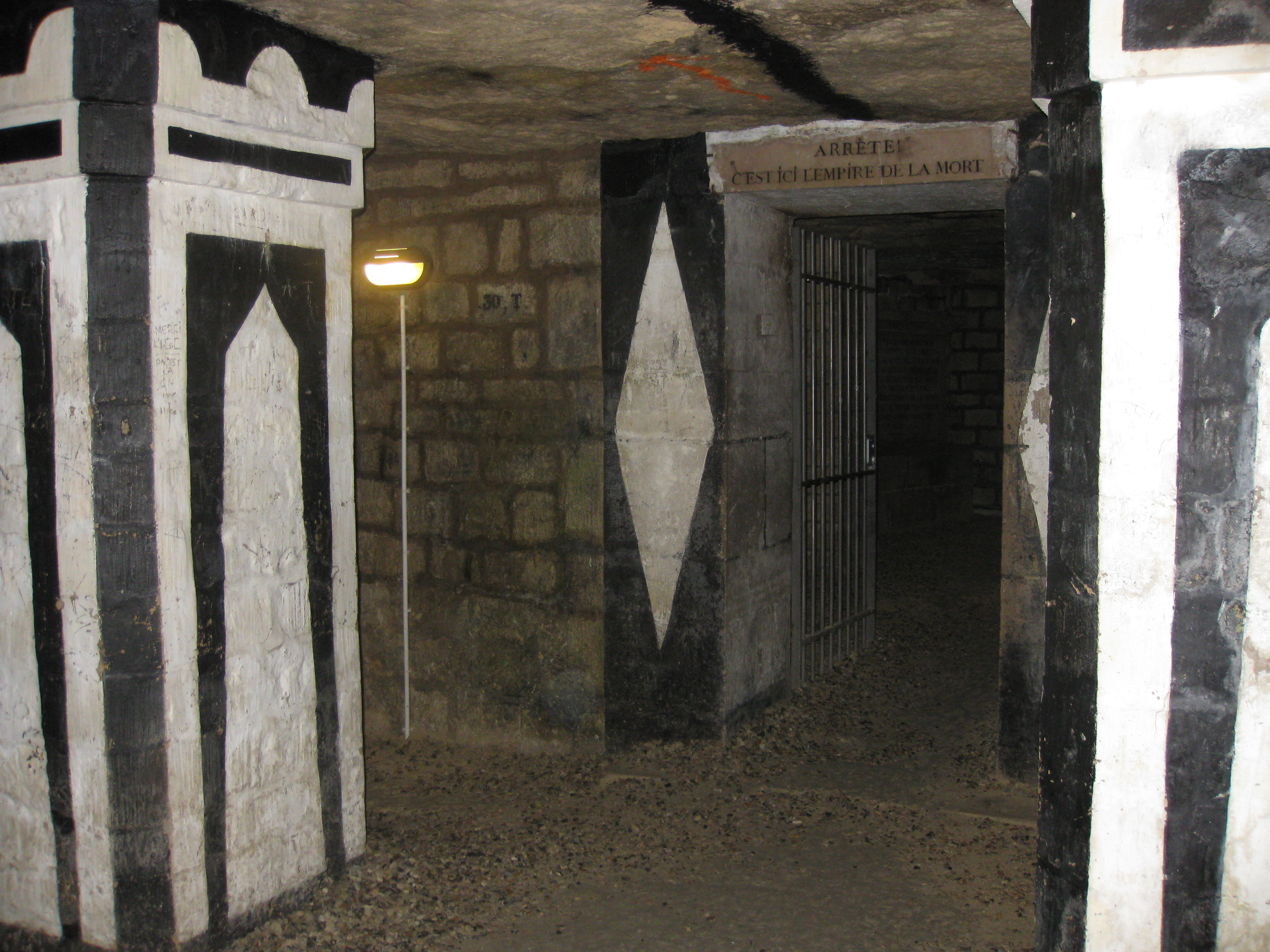 Catecombes de Paris הקטקומבות של פריז